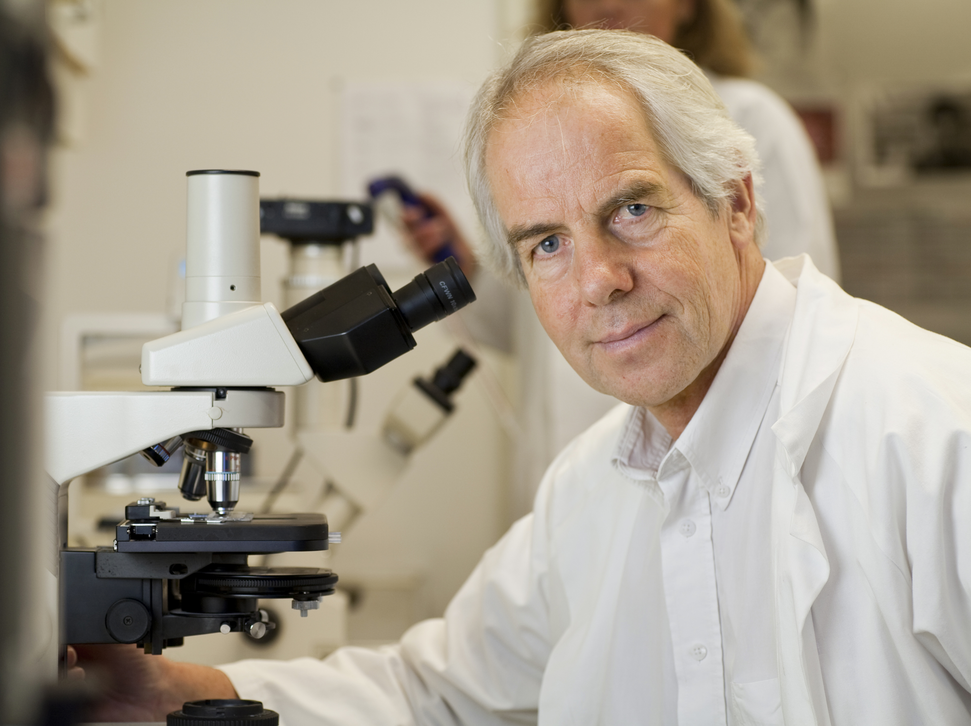 Oslo 20081204 Portretter for Kreftforeningen. Bjarne Bogen. Foto: Nyebilder